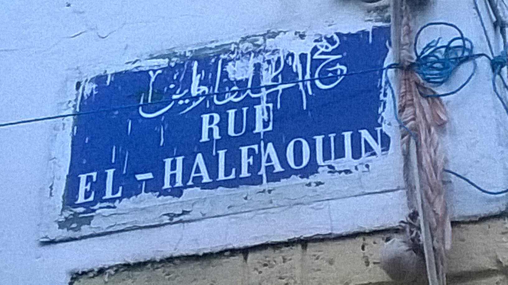 El Halfaouine, Bab Souika , Tunis الحلفاوين, باب سويقة ، تونس